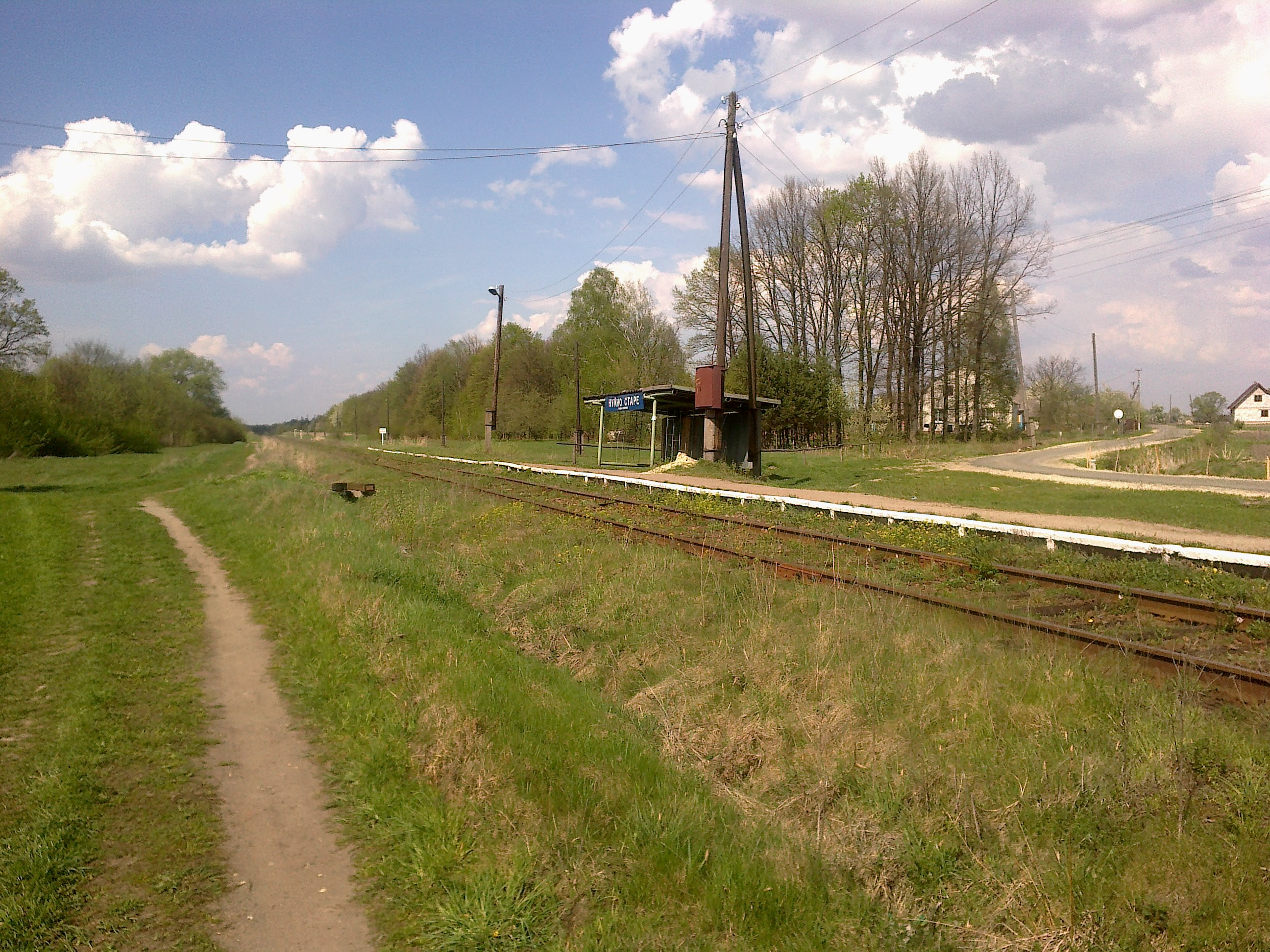 Зупинний пункт Нуйно-Старе